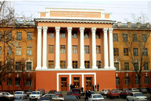 Template:Лабораторный корпус СФУ